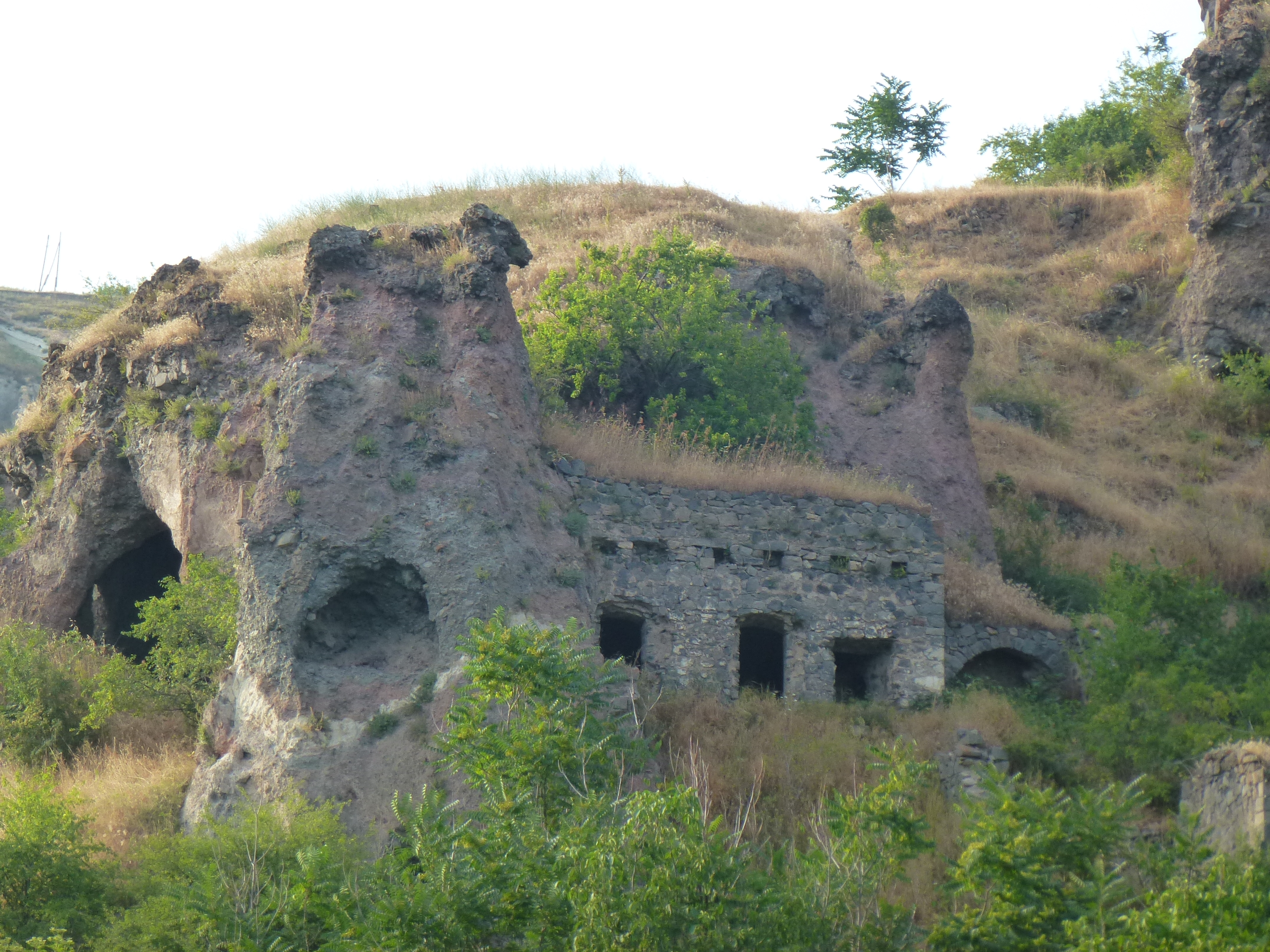 Գյուղատեղի Խնձորեսկ, Հայաստան 45/5